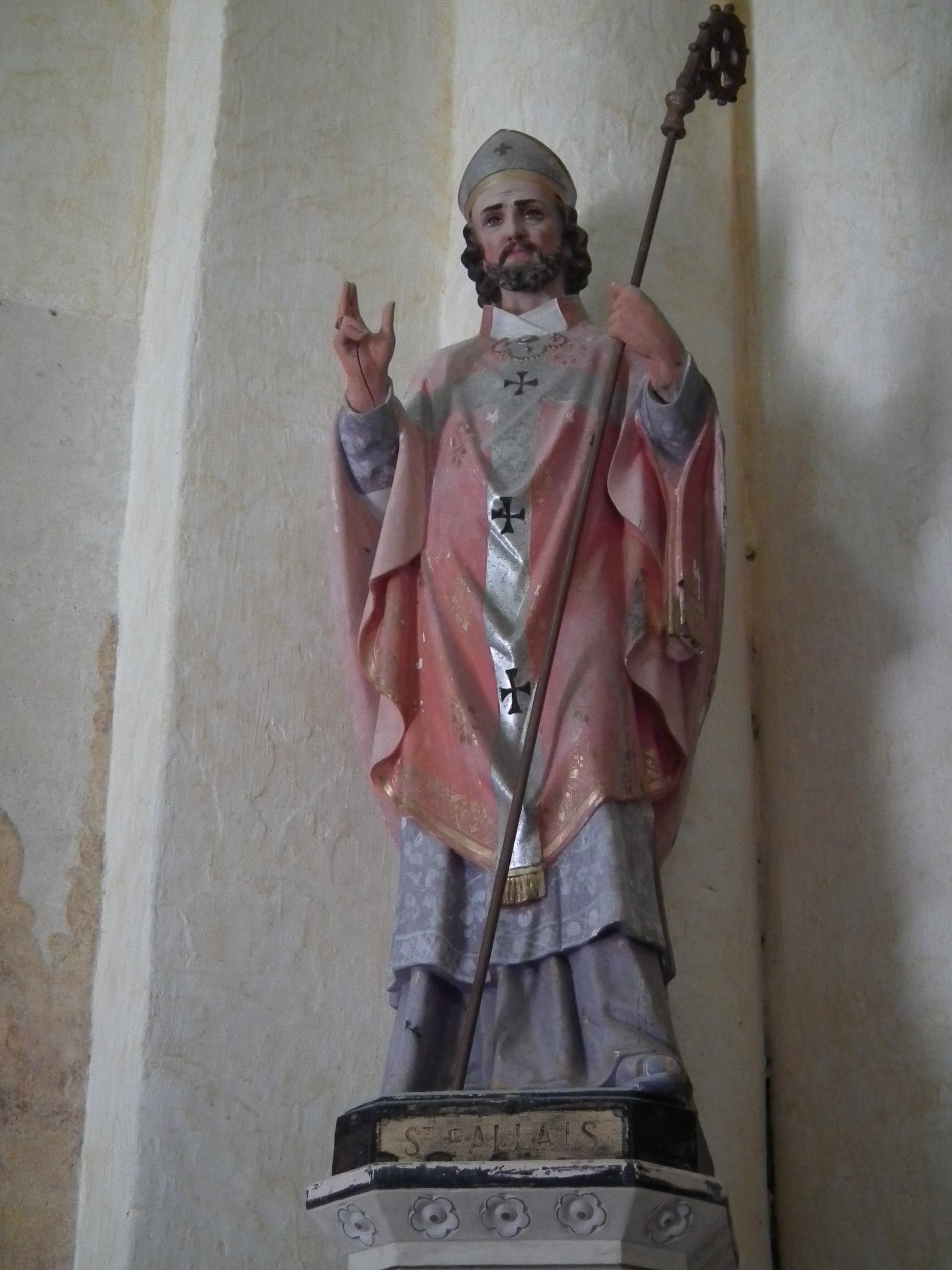 Statue de Pallais de Saintes (Palladius), évêque et saint de l'Eglise catholique.